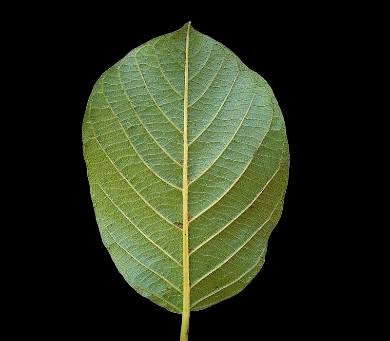 Rhamnus frangula